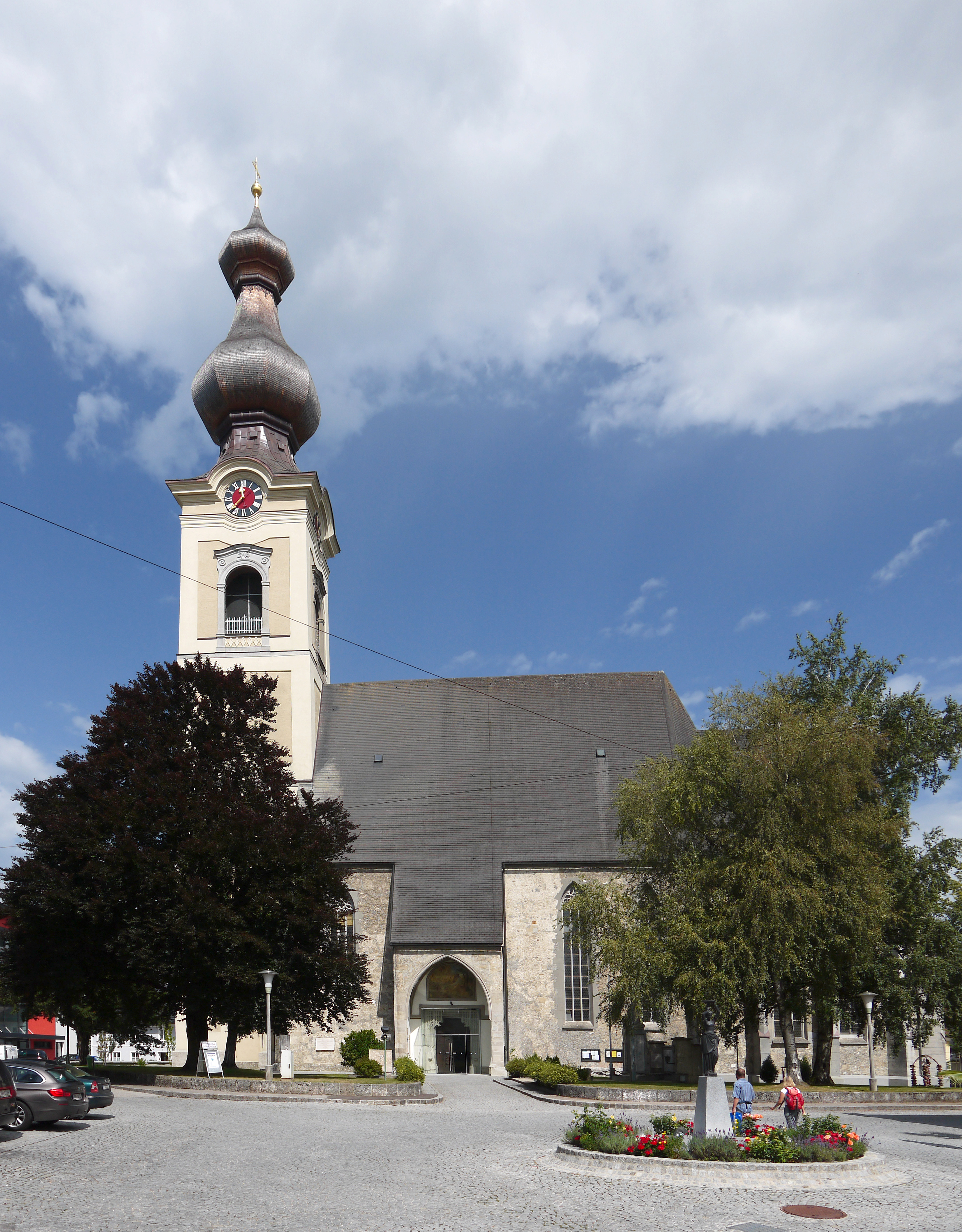 Kath. Pfarrkirche Mariä Himmelfahrt, Vöcklamarkt, Oberösterreich.